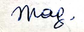 Signature de René Magritte pour ses amis (carte postale représentant Notre Dame adressée de Paris par René et Georgette Magritte à "Msieu Dame Scutenaire" en 1960).